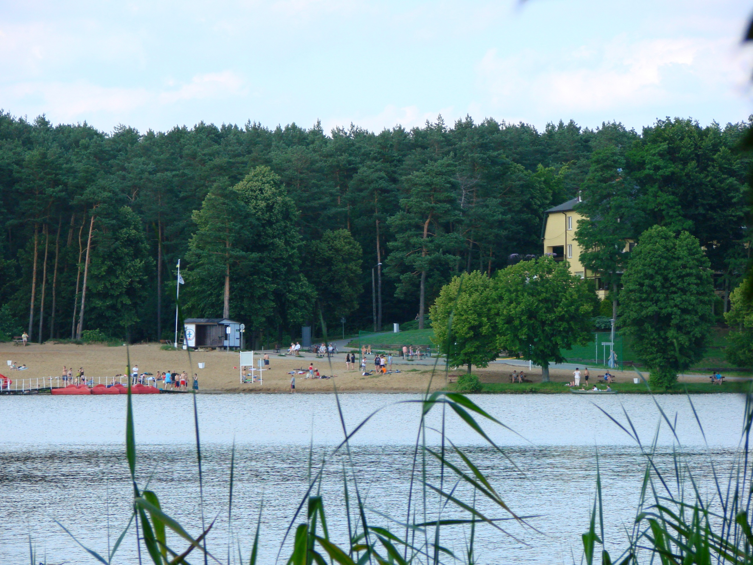 Plaża Miejska nad Jeziorem Sępoleńskim, po prawej stronie "Hotel Jan *** ", ul. Leśna. Place and Obiect in Sępólno Krajeńskie, Poland.